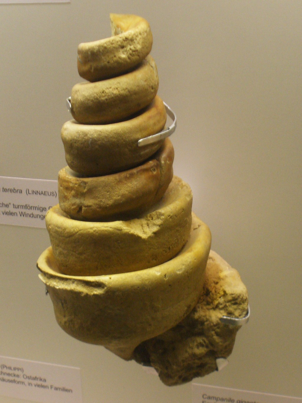 Fossil of Campanile, an extinct mollusc- Took the photo at Senckenberg Museum of Frankfurt